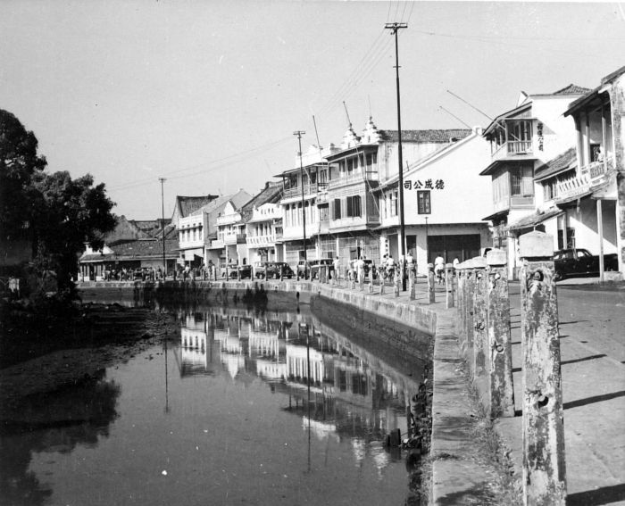 Repronegatief. Kali Besar in oude stadswijk te Djakarta